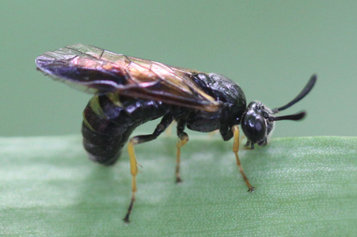 Arge rustica, am 10. Mai 2019 in einem Wald nahe Walldorf/Baden